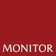 neues Logo der Monitor Group nach Änderung der CI